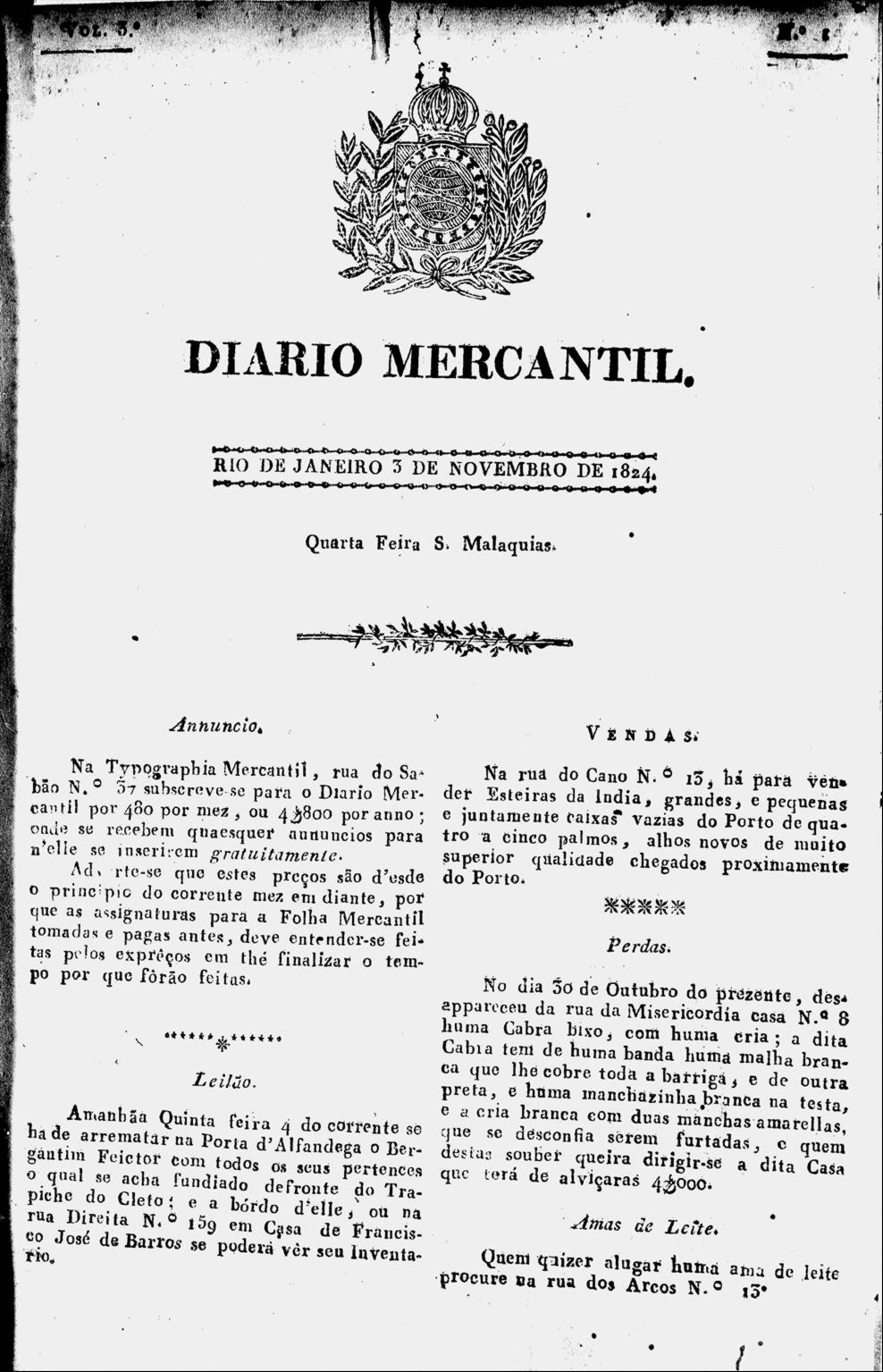 Primeira página da primeira edição do jornal Diário Mercantil, periódico que foi precursor do Jornal do Commercio.